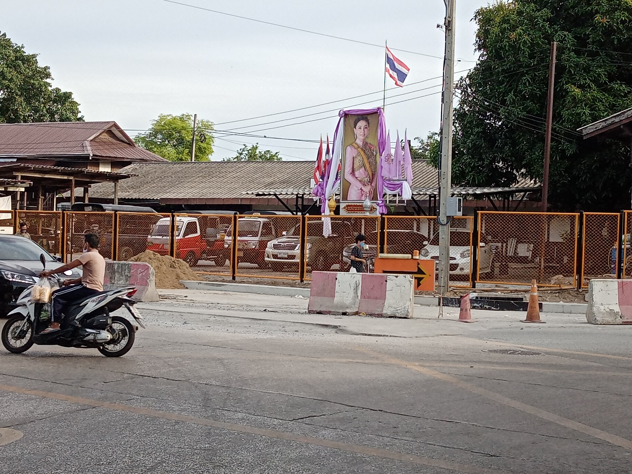 แยกบ้านเนิน ปลายทางของถนนอิสรภาพตัดกับถนนสุทธาวาสและถนนรถไฟ ใกล้กับสถานีรถไฟธนบุรี (บางกอกน้อย)